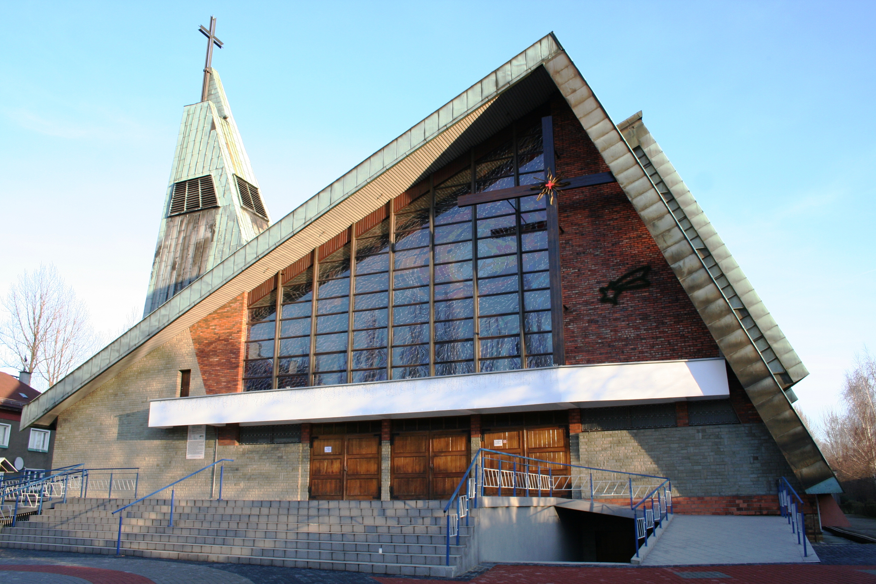 Kościół Jezusa Chrystusa Dobrego Pasterza w Chorzowie Batorym